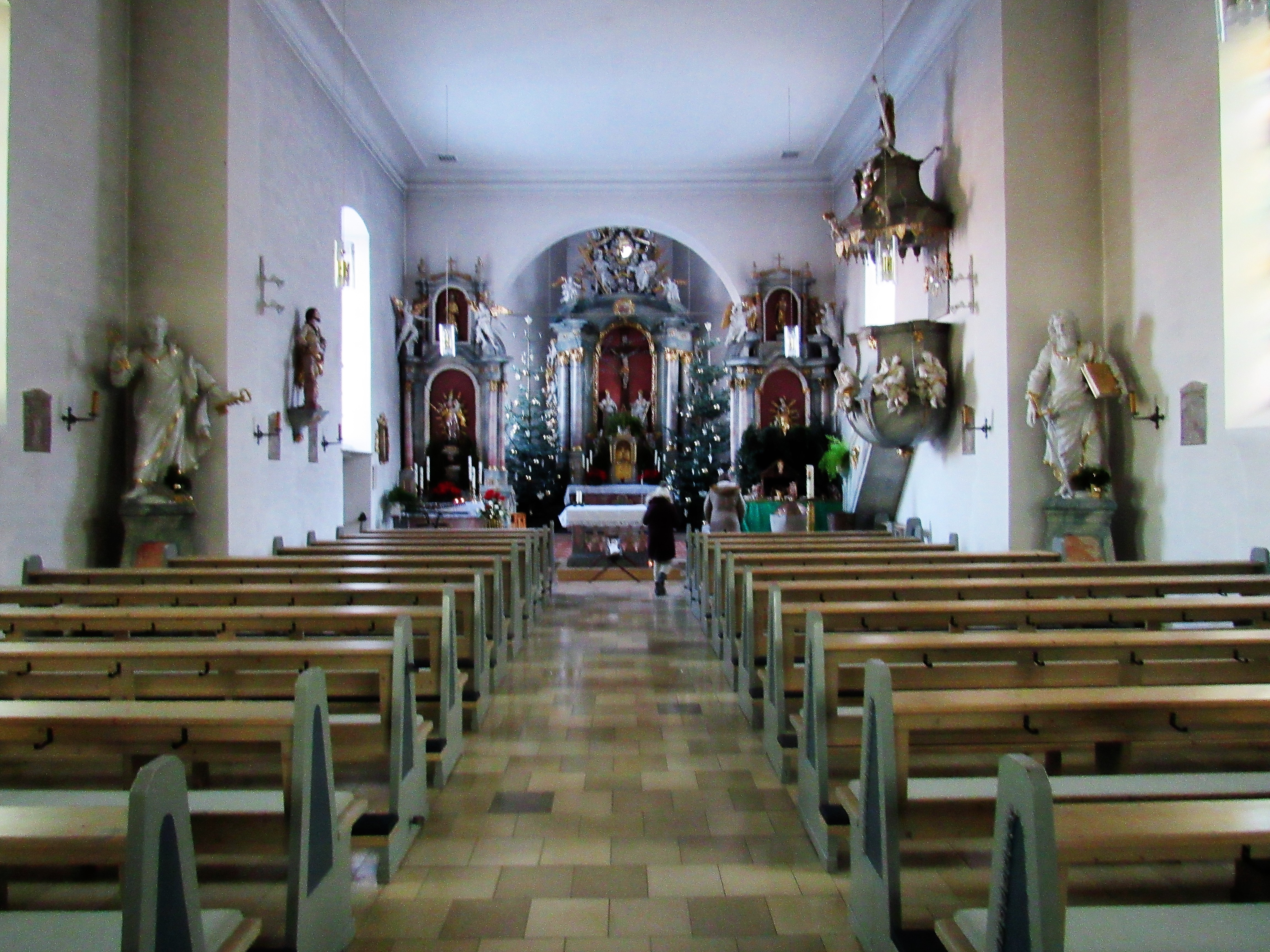 Inneres der Kirche